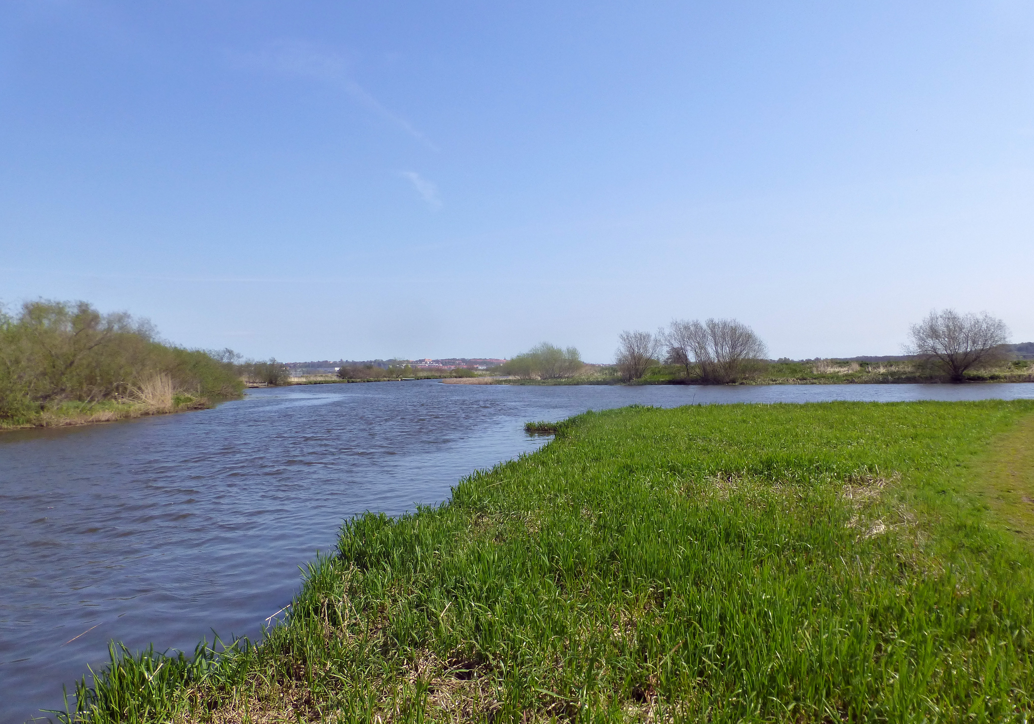 Nørreås udløb Gudenå; Nørreå til venstre